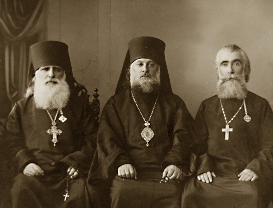 მარცხნიდან არქიმანდრიტი ამბროსი ხელაია, ეპისკოპოსი ანტონ გიორგაძე, დეკანოზი კალისტრატე ცინცაძე. პეტერბურგი. 1917 წ